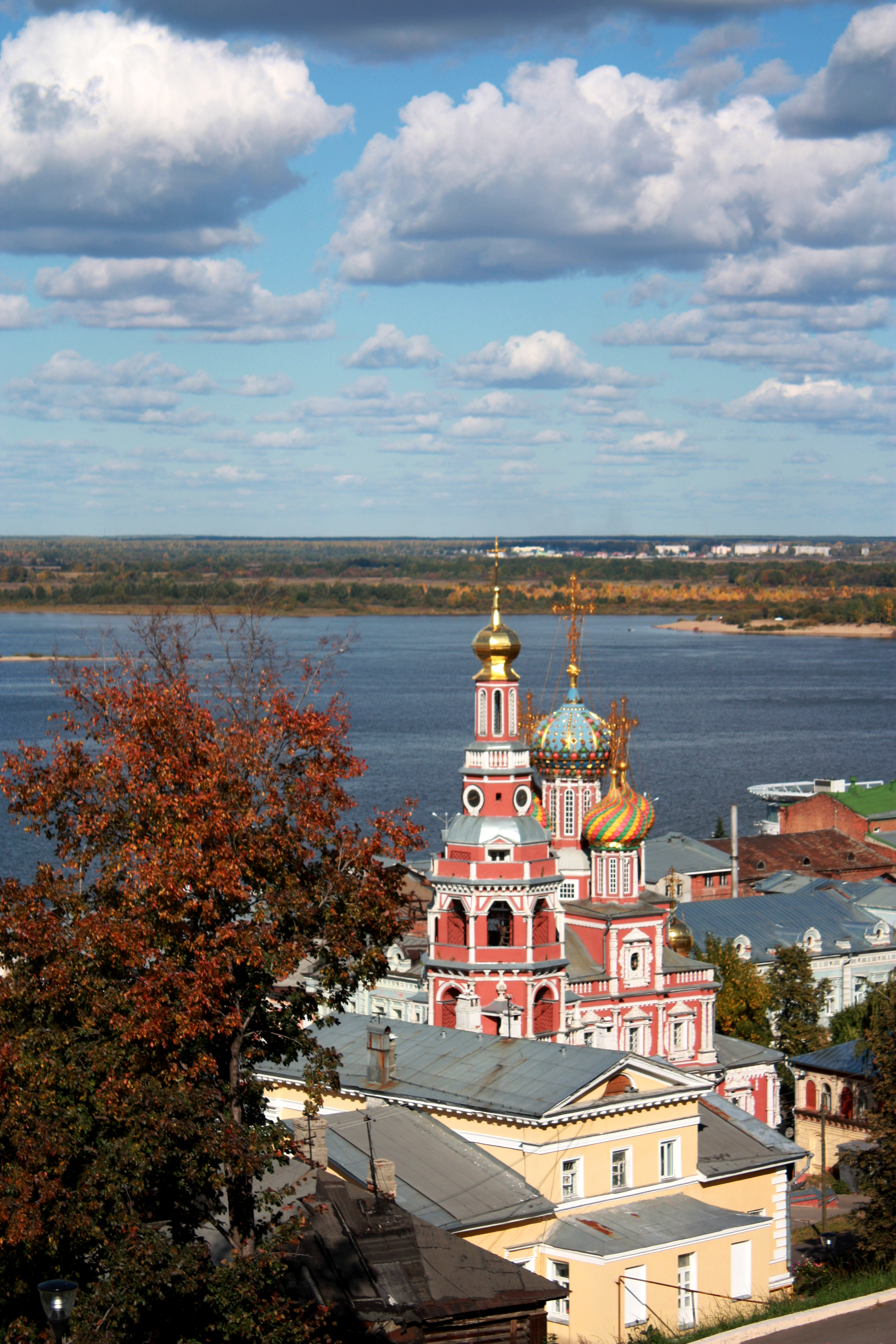 Nizhny Novgorod